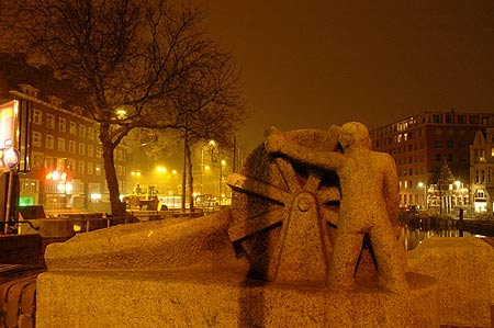 Brug 199 van Overtoom/Amstelveenseweg naar Surinamestraat